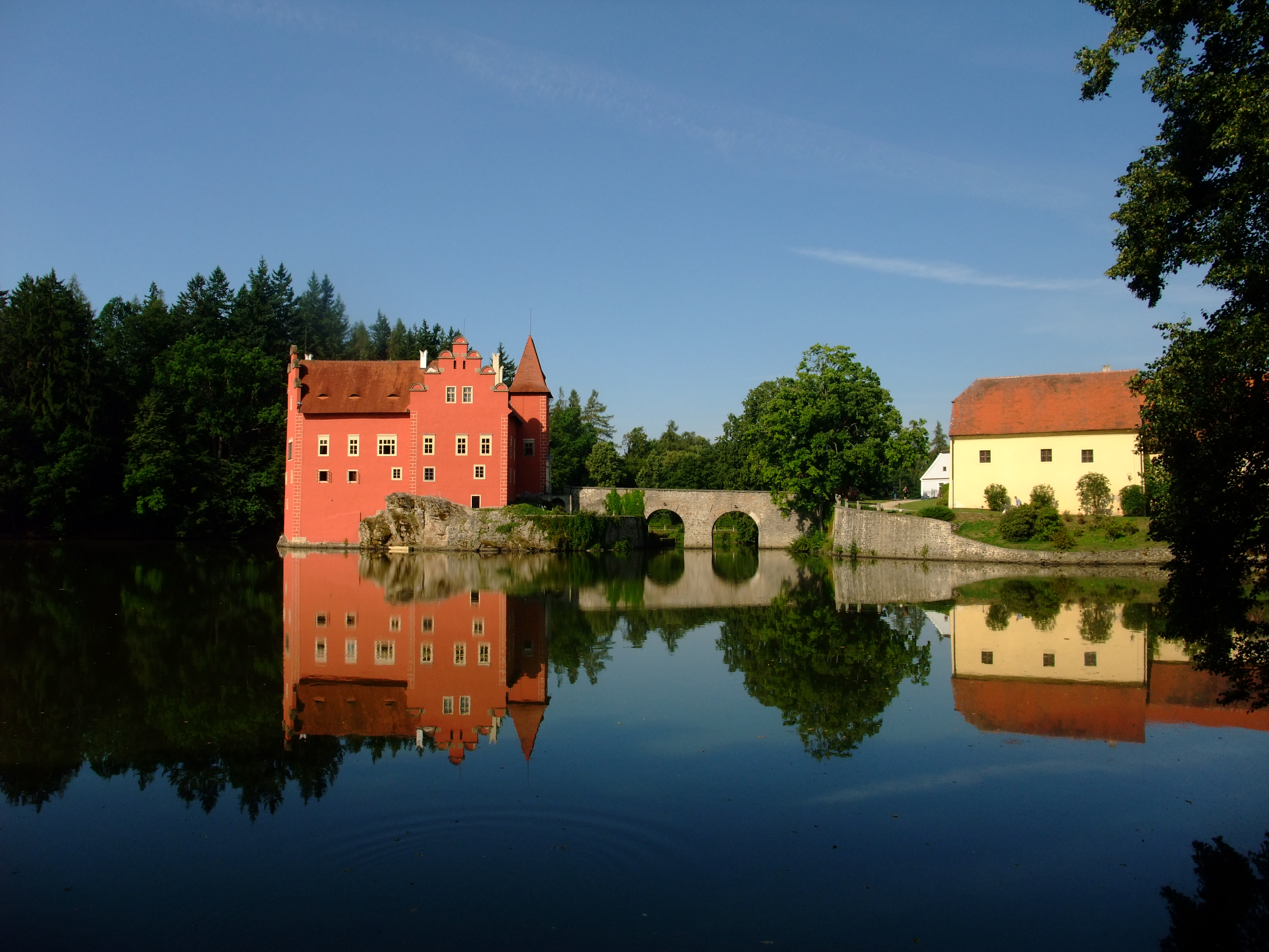 Zámek Červená Lhota, Červená Lhota 1, Červená Lhota (Pluhův Žďár).